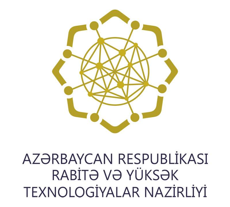 Azərbaycan Respublikası Rabitə və Yüksək Texnologiyalar Nazirliyinin loqosu